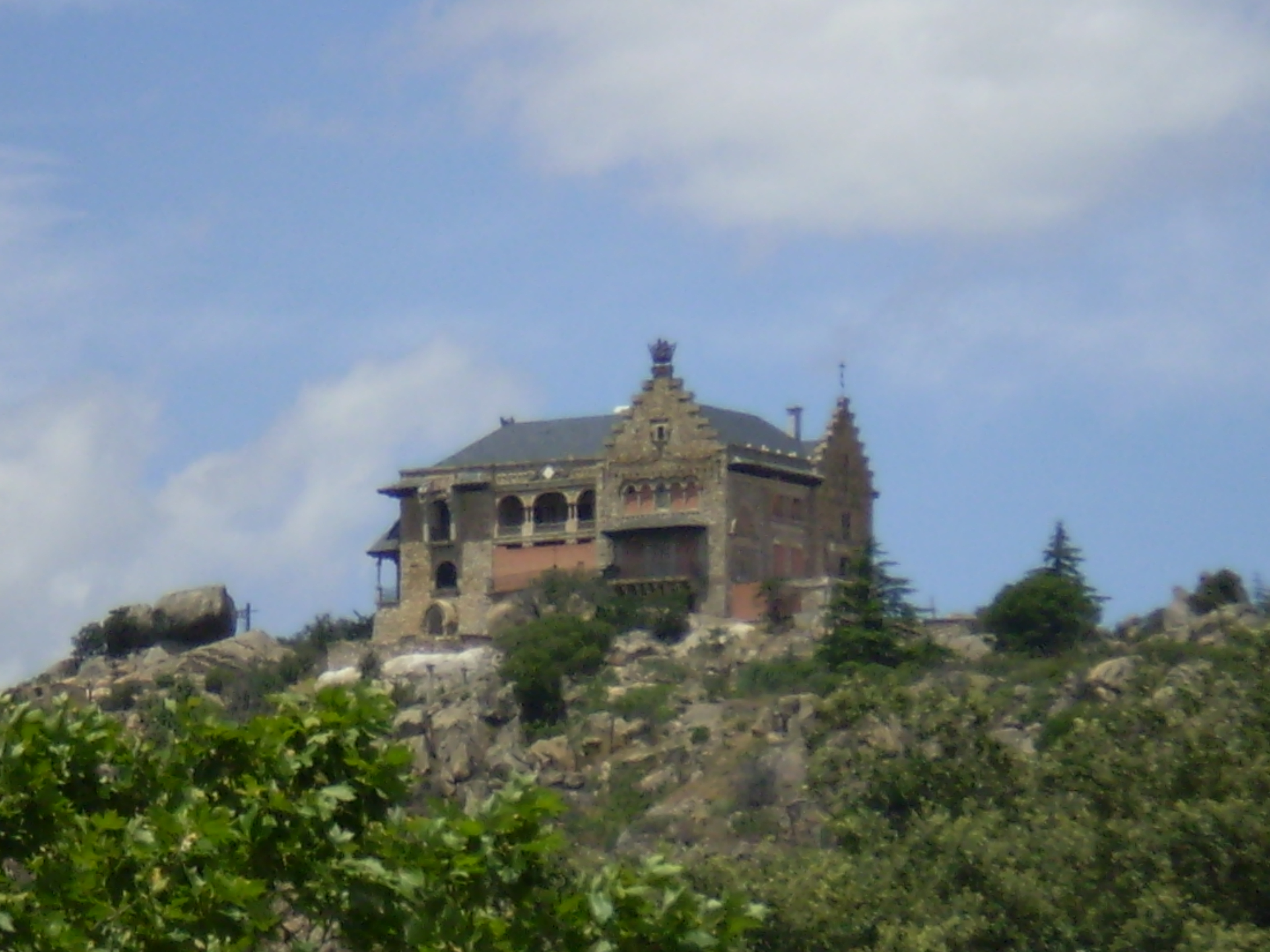 Palacio del Canto del Pico. Torrelodones, Madrid, Spain